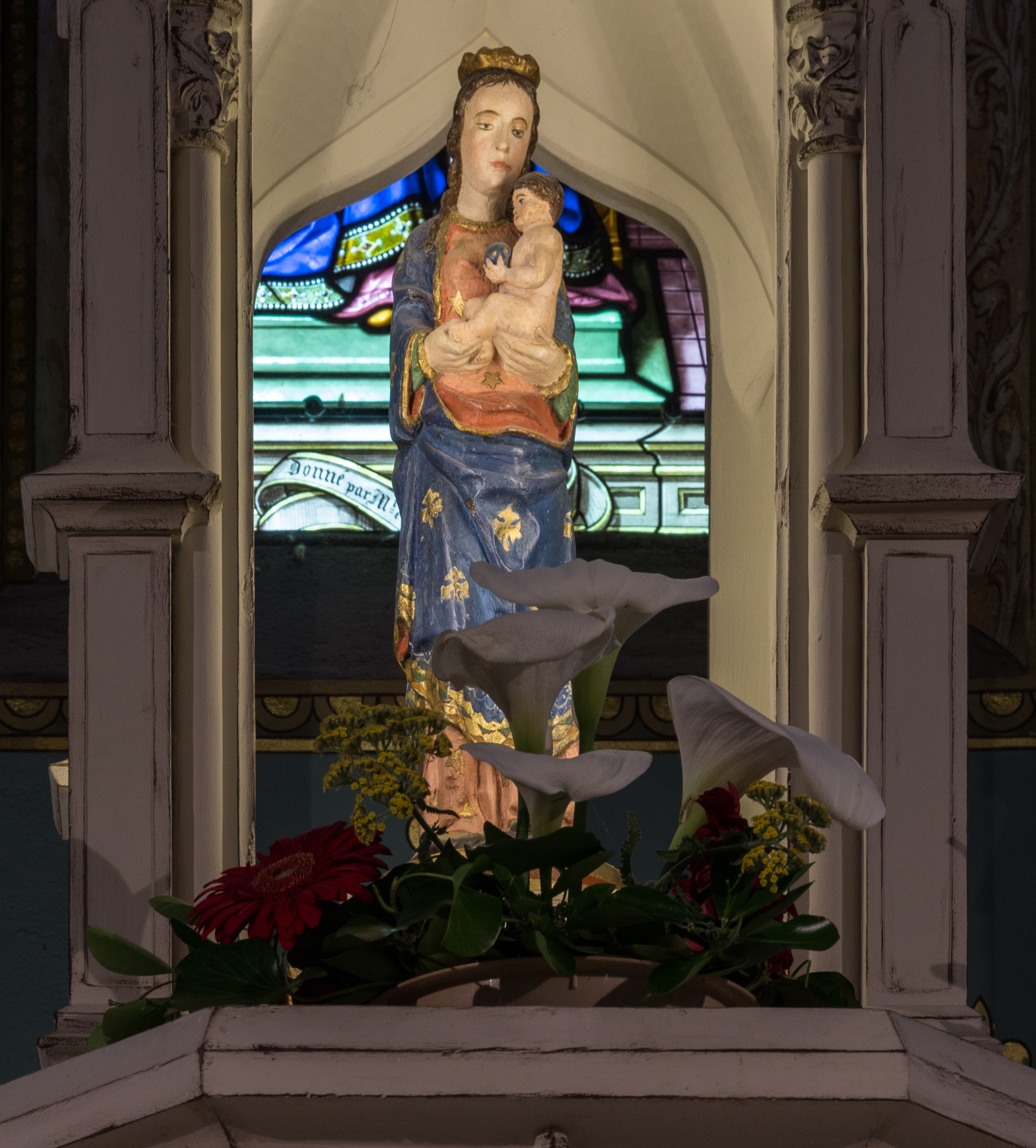 Vierge à l'enfant Condat Libourne Gironde